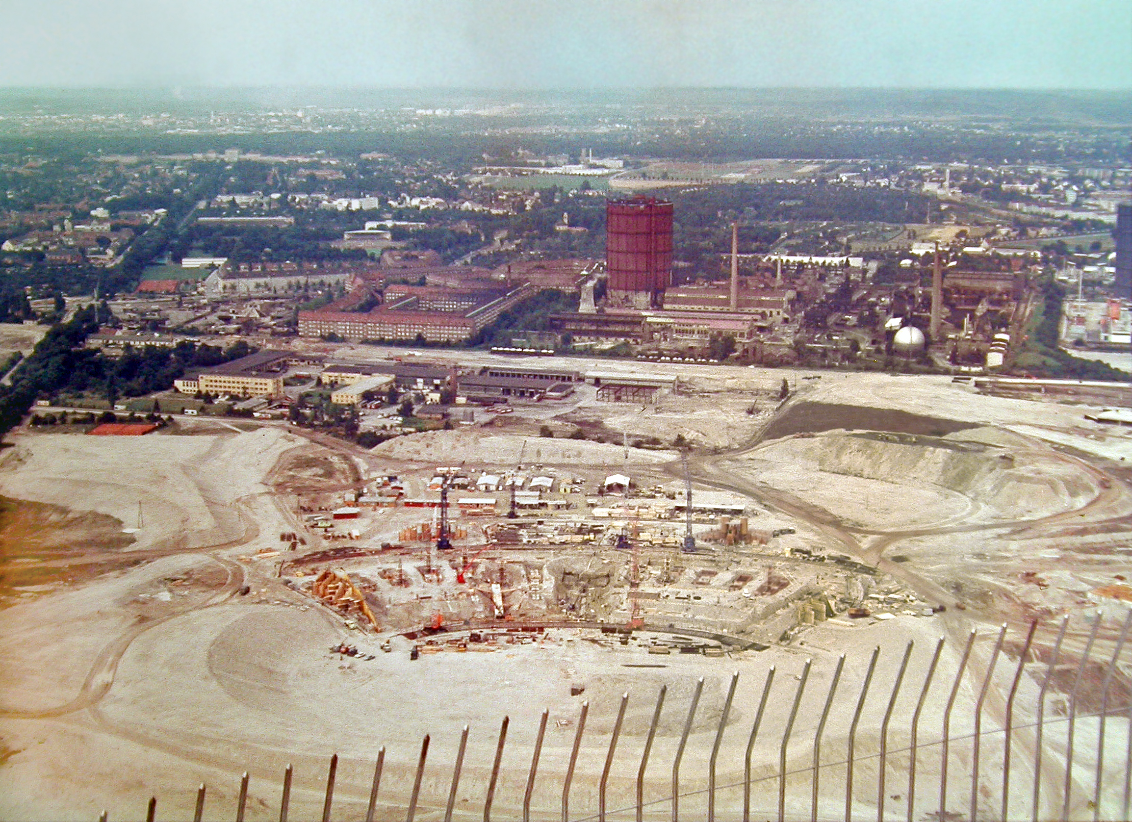 1969 - Baustelle Olympiastadion